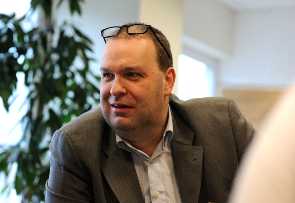 Thorsten Krüger im Gespräch